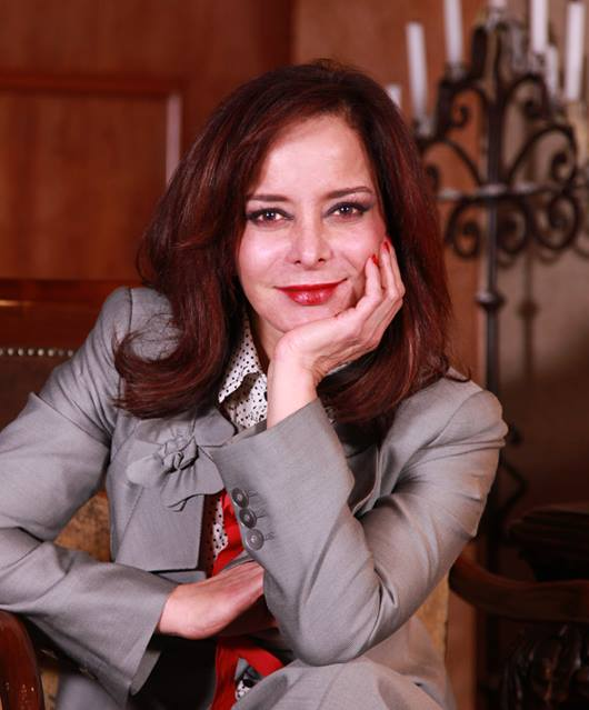 diputada por el Partido de la Revolución Democrática del distrito XXII del Distrito Federal en la LXII Legislatura del Congreso de la Unión de México